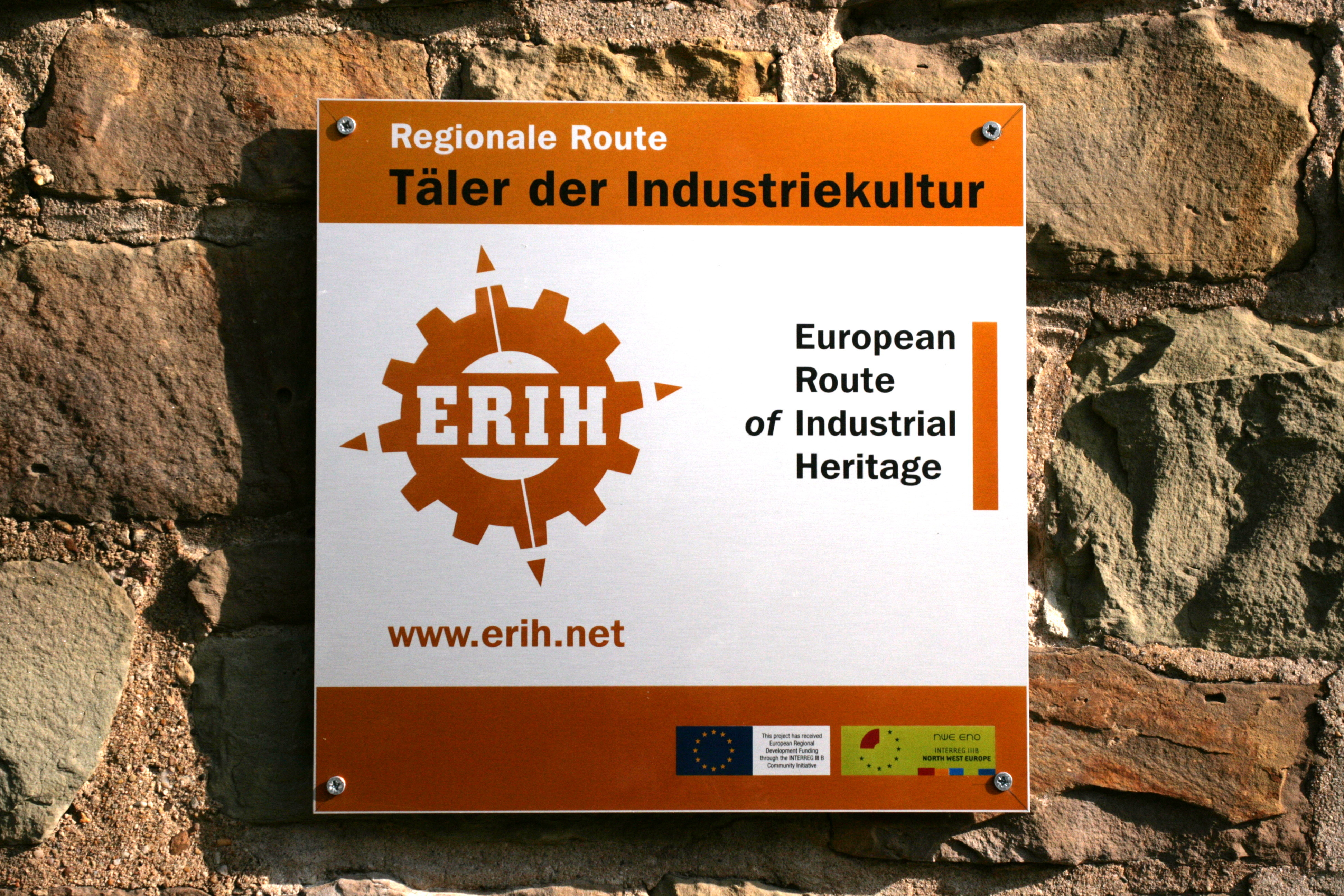 Bergisches Museum für Bergbau, Handwerk und Gewerbe, Burggraben 9-21 in Bergisch Gladbach